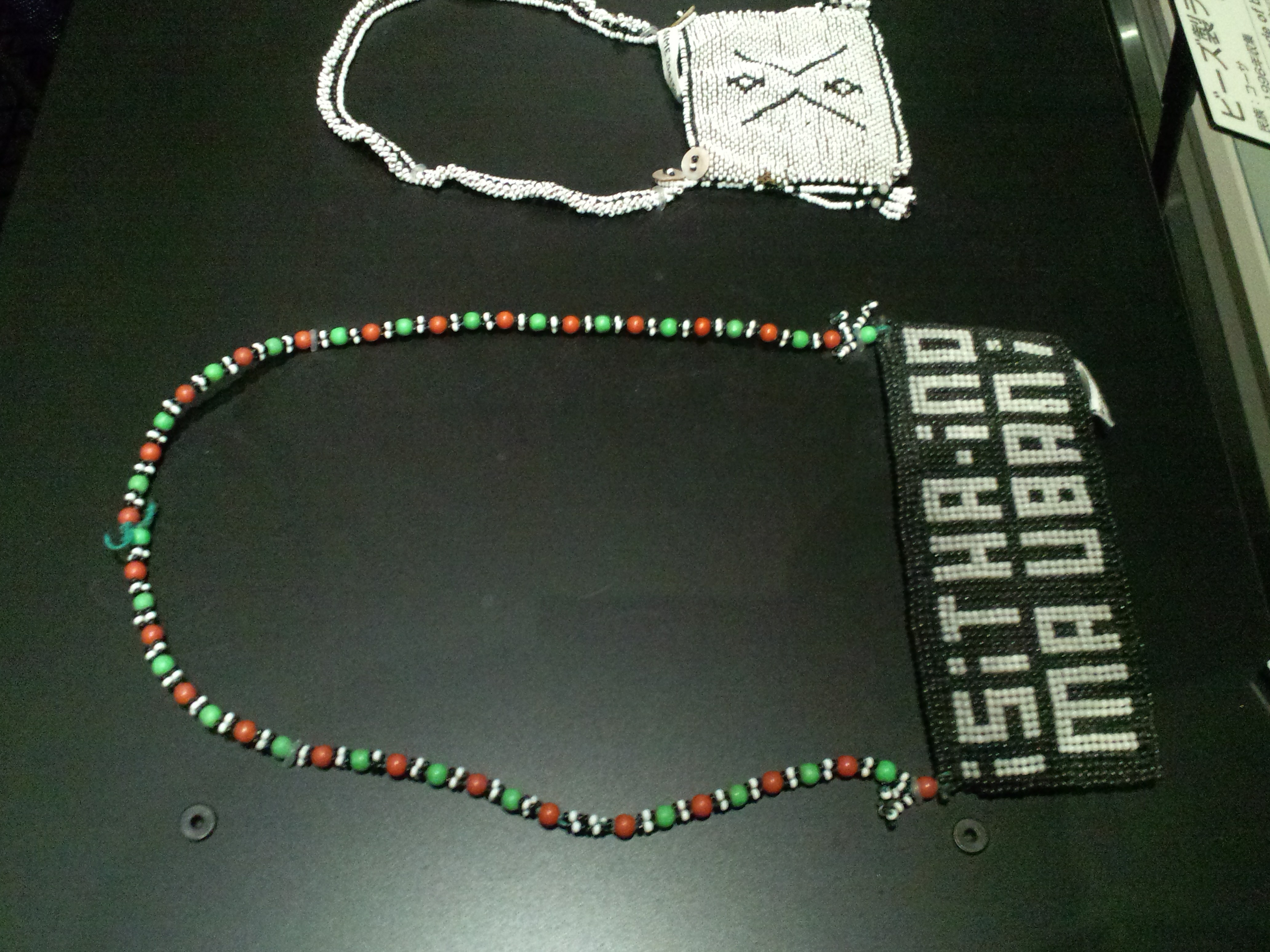 国立民族学博物館（大阪） ビーズ製ラブレター（南アフリカ、ズールー族、1996年収集